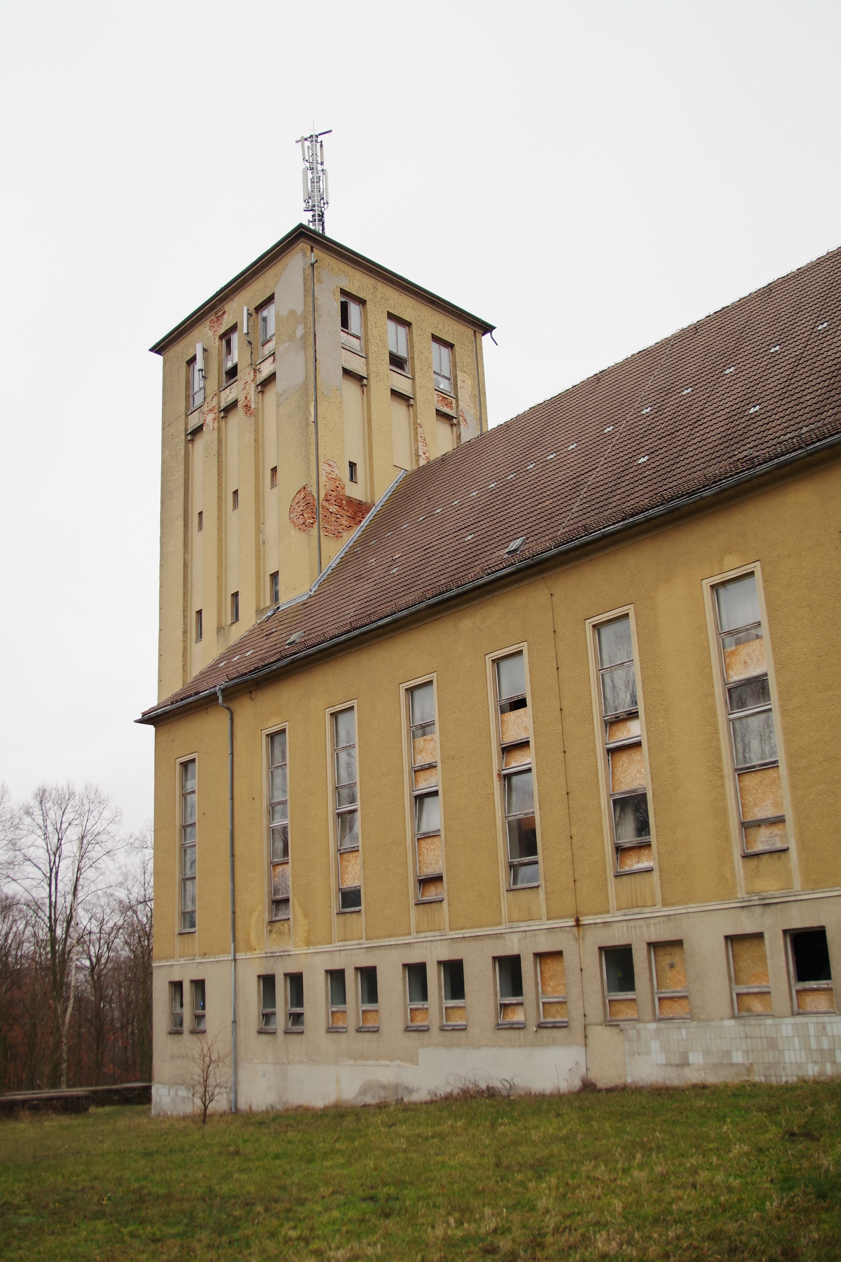 ehemalige Napola und spätere Bezirksparteischule auf dem Großen Ziegenberg in Ballenstedt